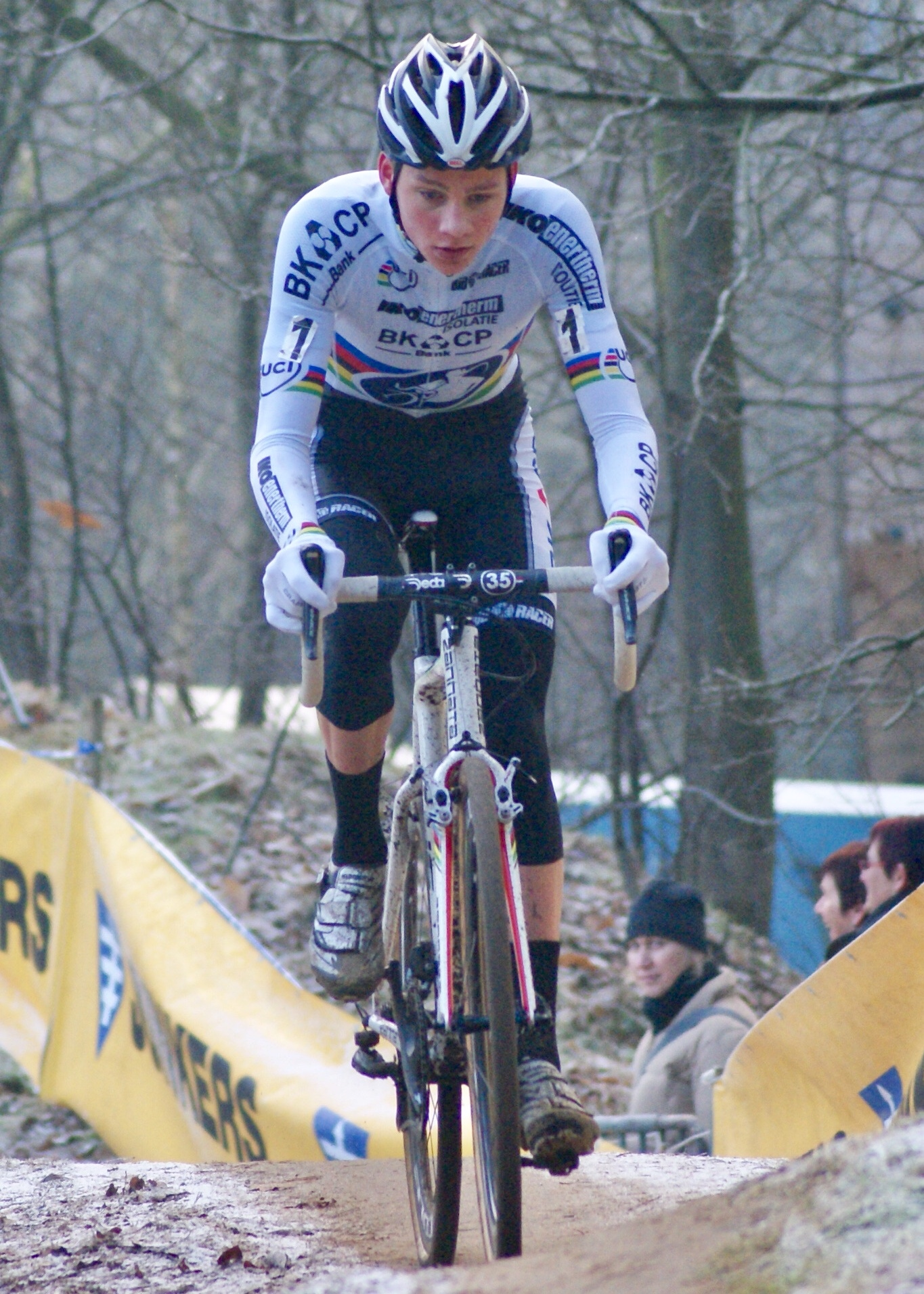 Mathieu van der Poel op weg naar winst in de Krawatencross in Lille in 2013.